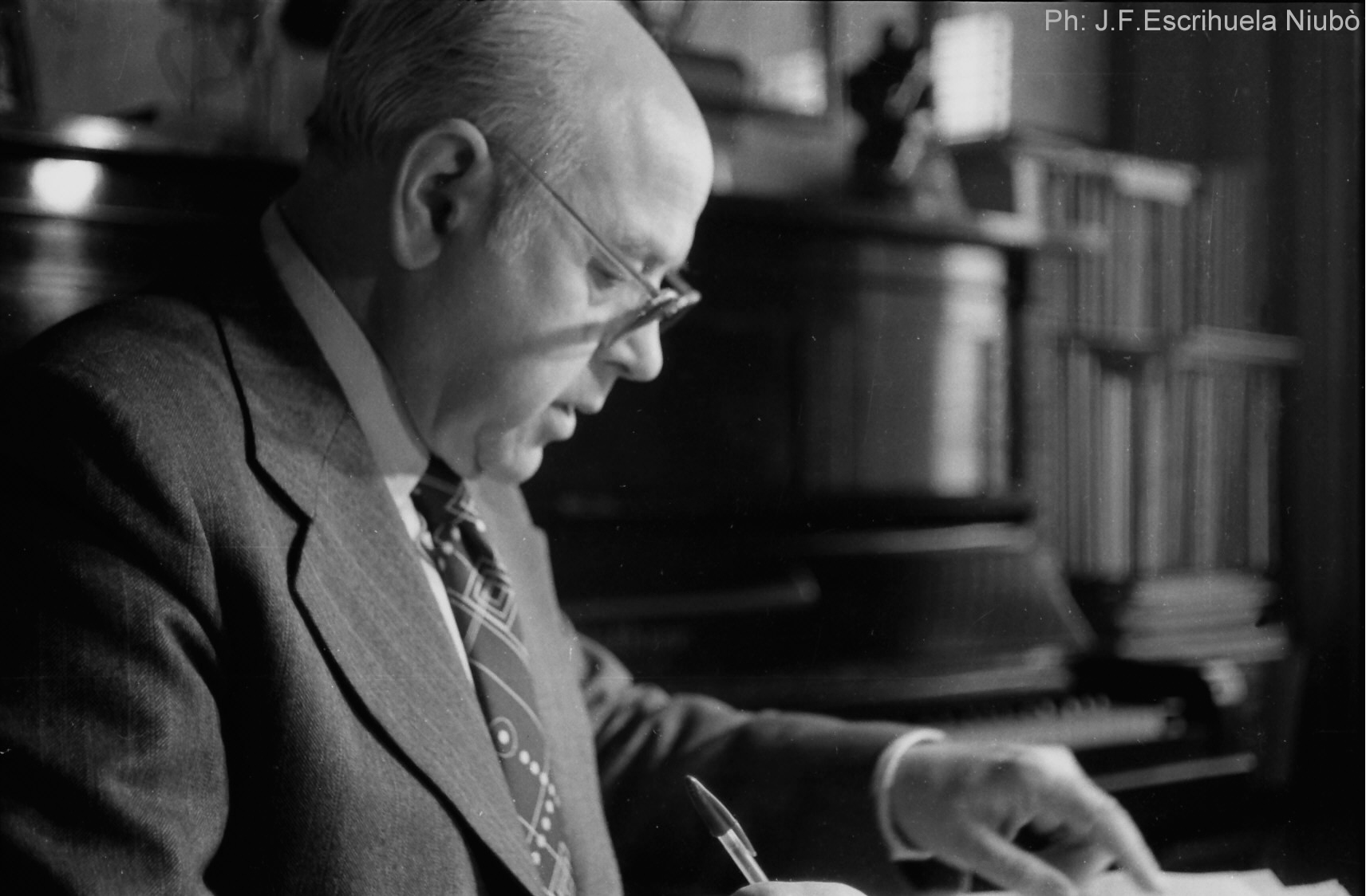 El mestre Joan Pich Santasusana treballant al seu estudi de Badalona